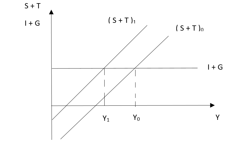 اقتصاد